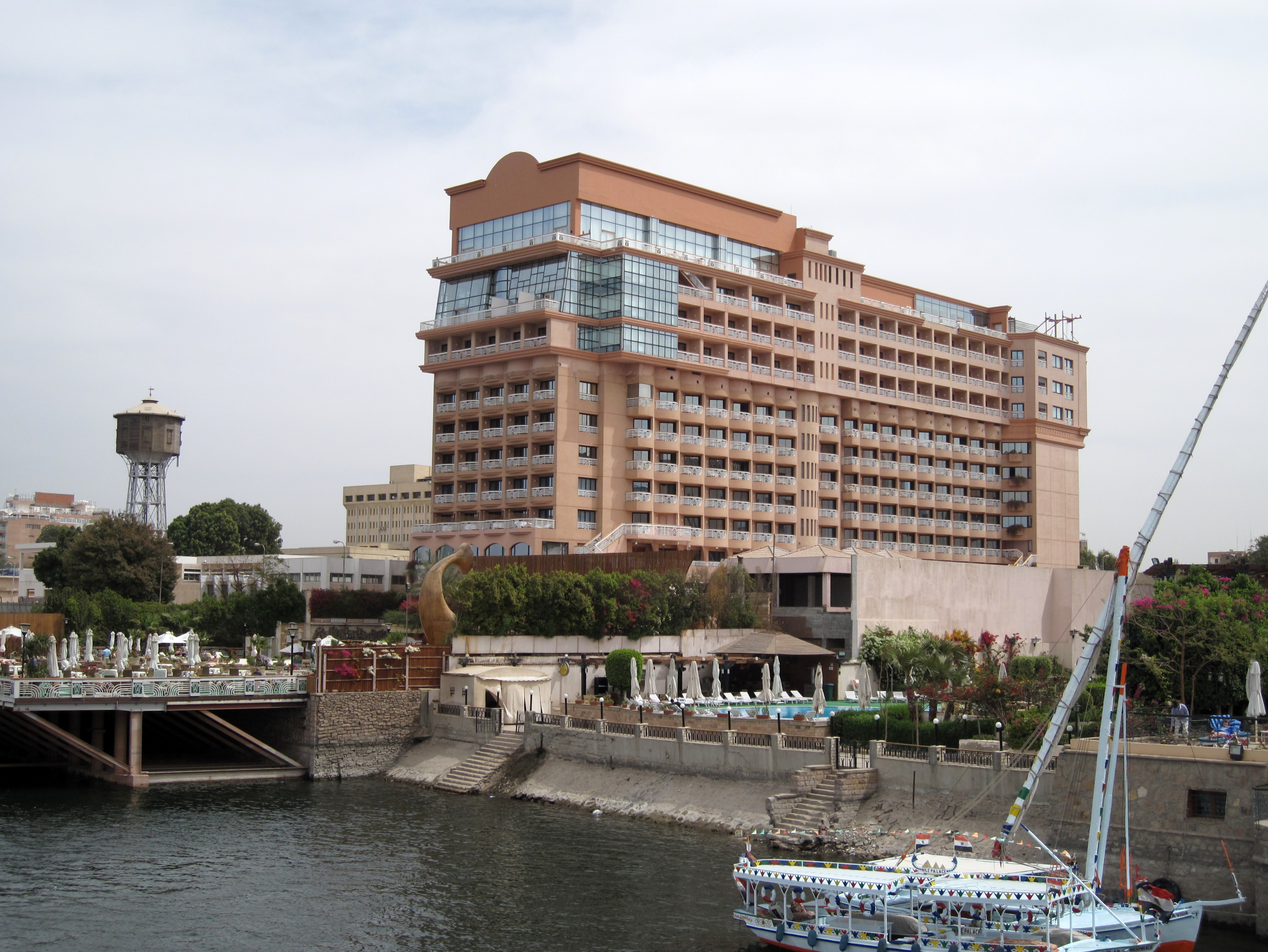 Sonesta St George Hotel in Luxor, Ägypten